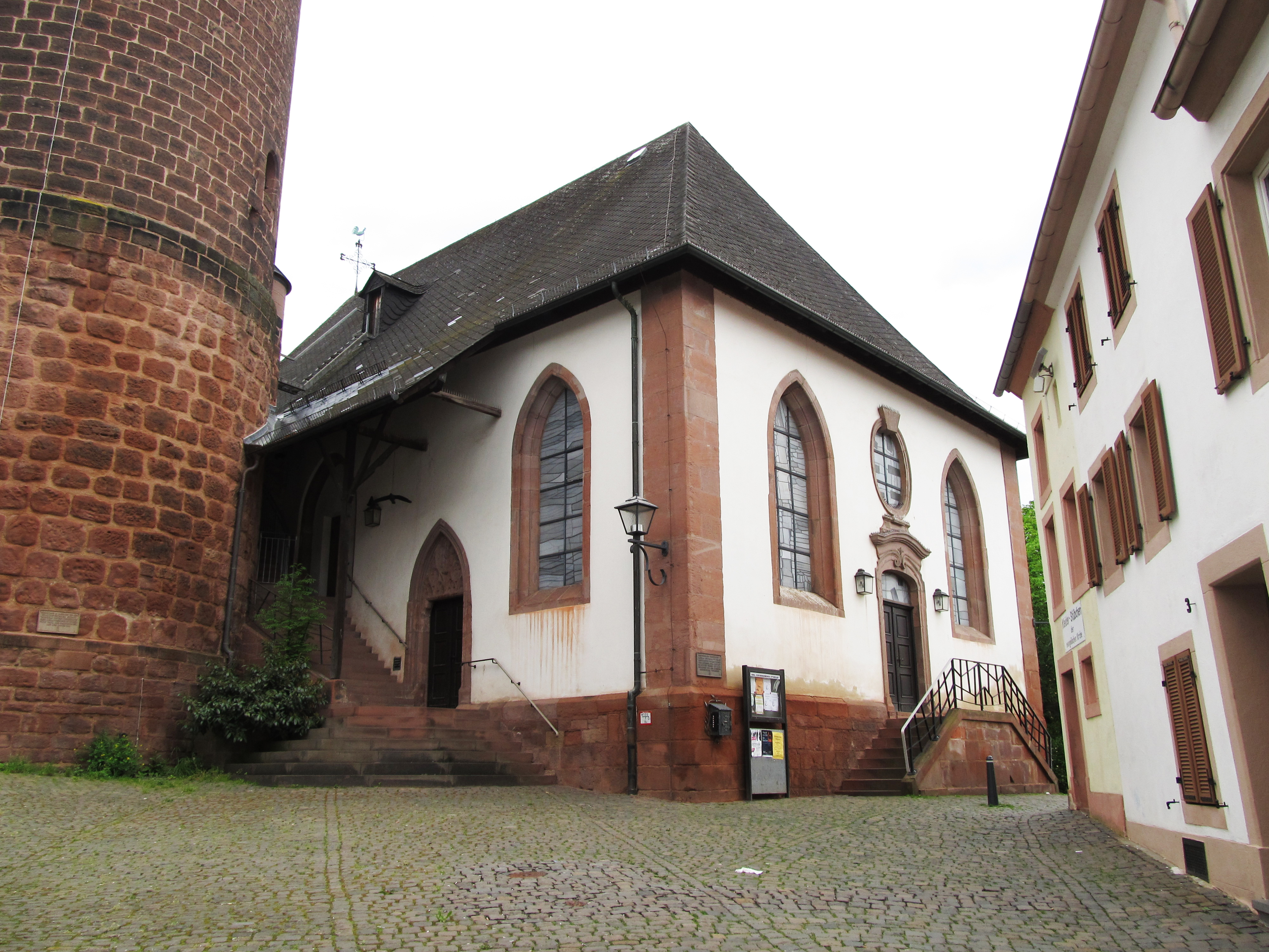 Protestantische Kirche in der Altstadt von Ottweiler